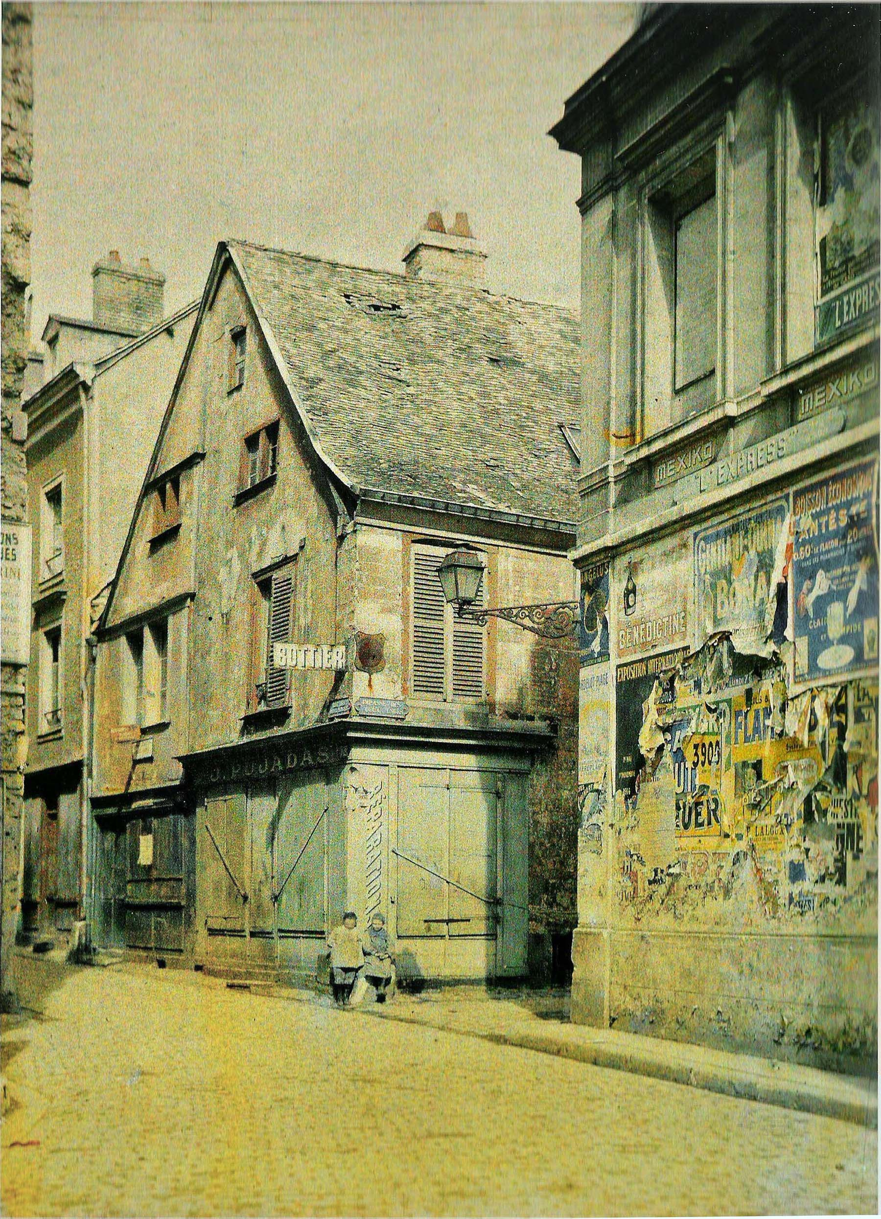 Reims rue des Deux Anges début 1917, autochrome de la Première Guerre mondiale, elle fut détruite pour laisser la place au Cours Langlet.